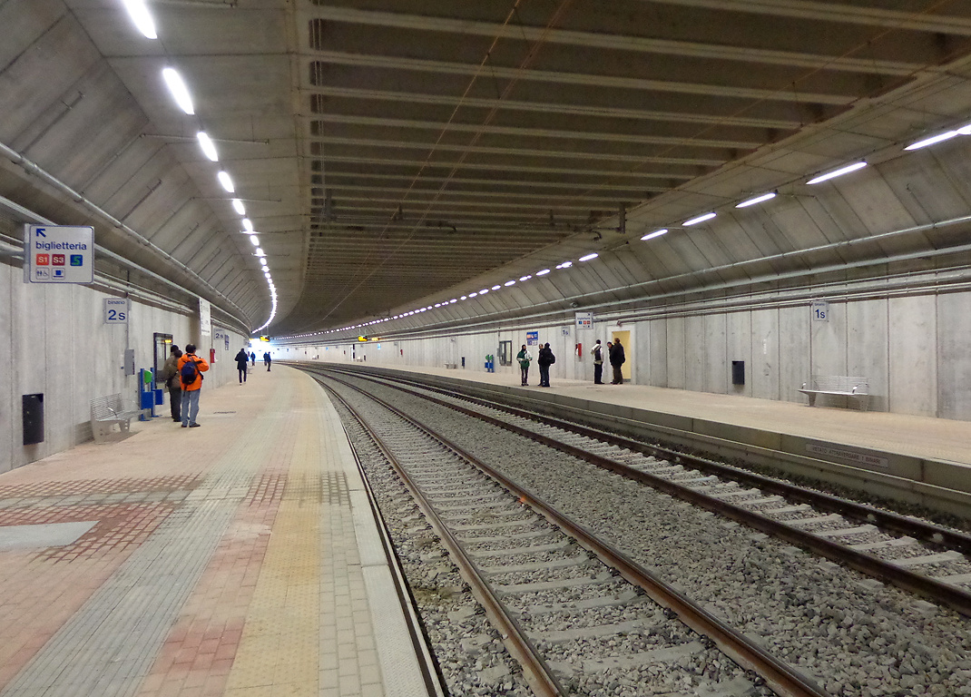 Stazione ferroviaria di Saronno Sud, i binari sotterranei 1s e 2s.